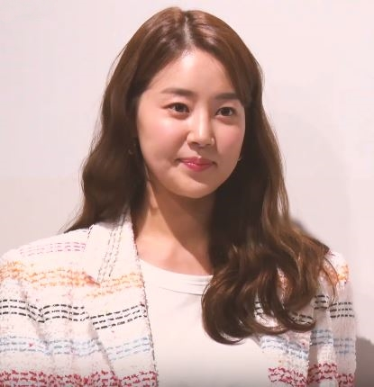 12일 오후 서울 JW 메리어트 호텔에서 한 코스메틱 브랜드의 국내 론칭 기념 행사가 열렸다.